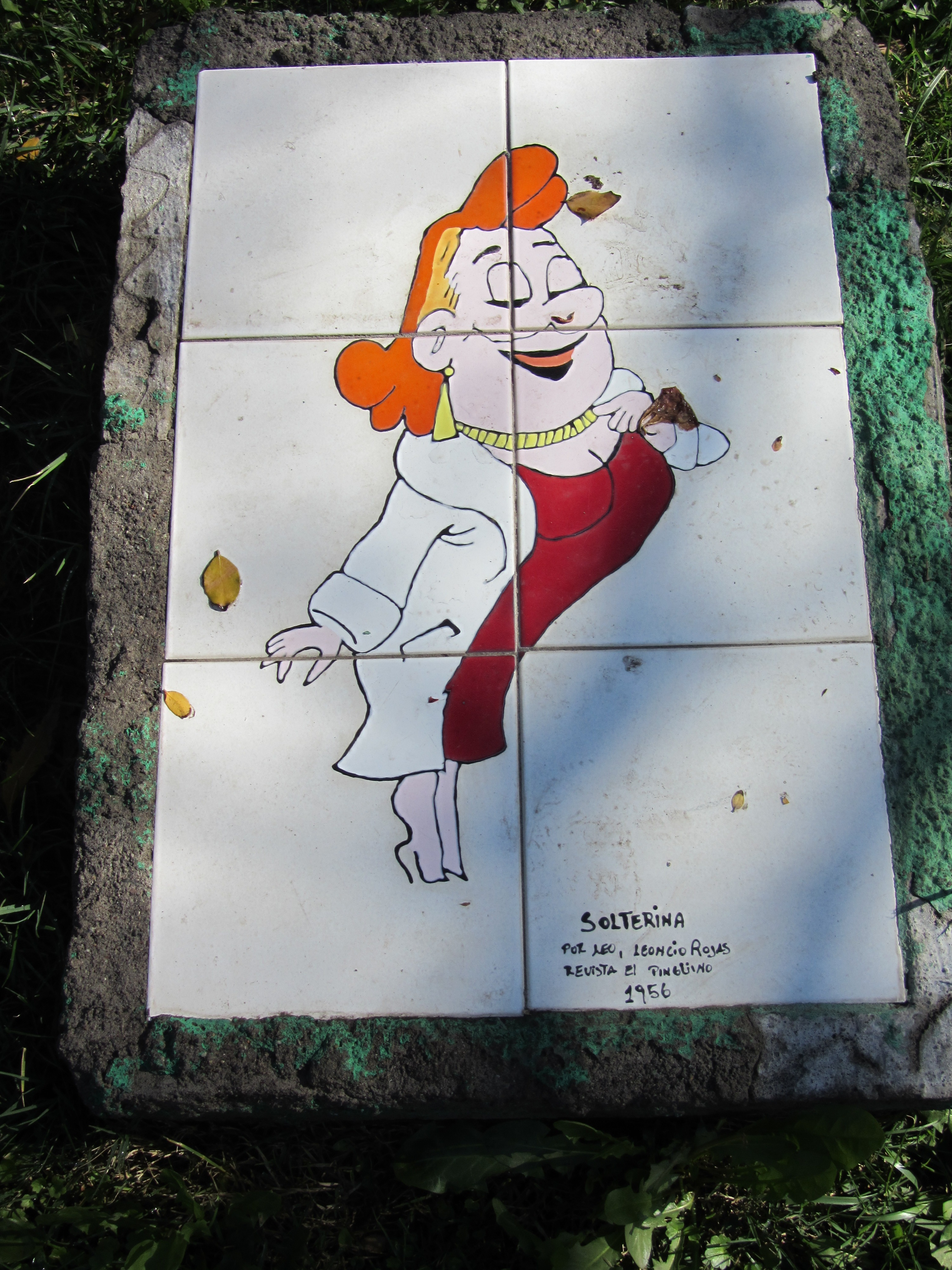 Parque del Cómic